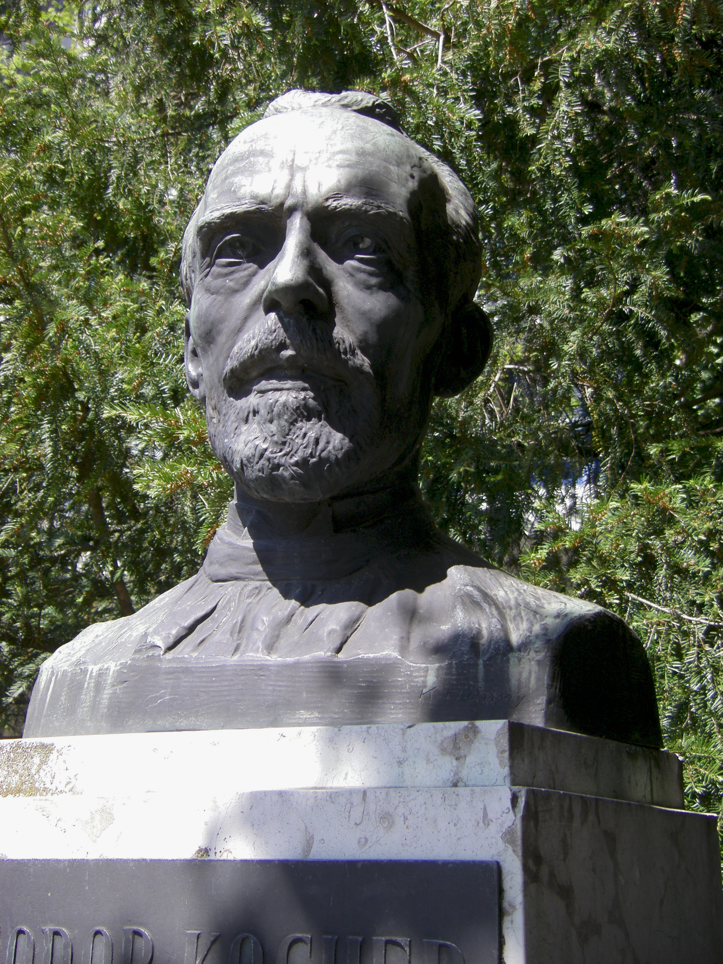 Büste Theodor Kochers beim Haupteingang des Inselspitals in Bern, Schweiz. Bildhauer: Karl Hänny (1879-1972). Büste von 1927.